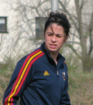 Marta Torrejón Moya, spanische Nationalspielerin